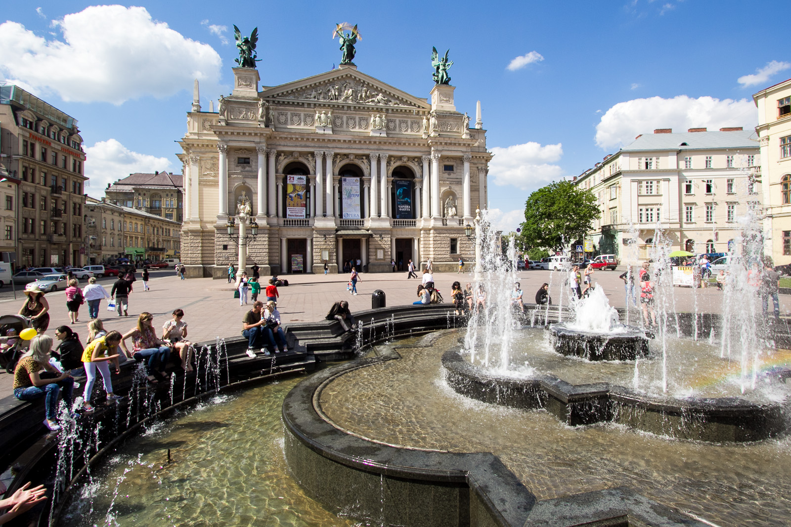 Театр опери та балету, в якому виступали видатні співаки, артисти, композитори світової слави, Львів, Свободи пр., 28